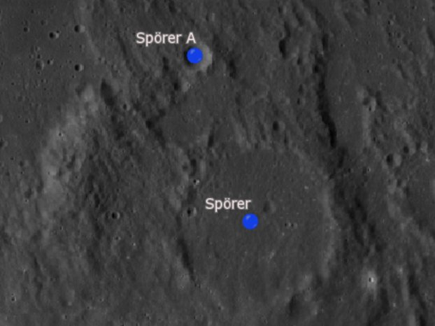 Cráter lunar Spörer. Cráteres satélite. (Imagen LRO)